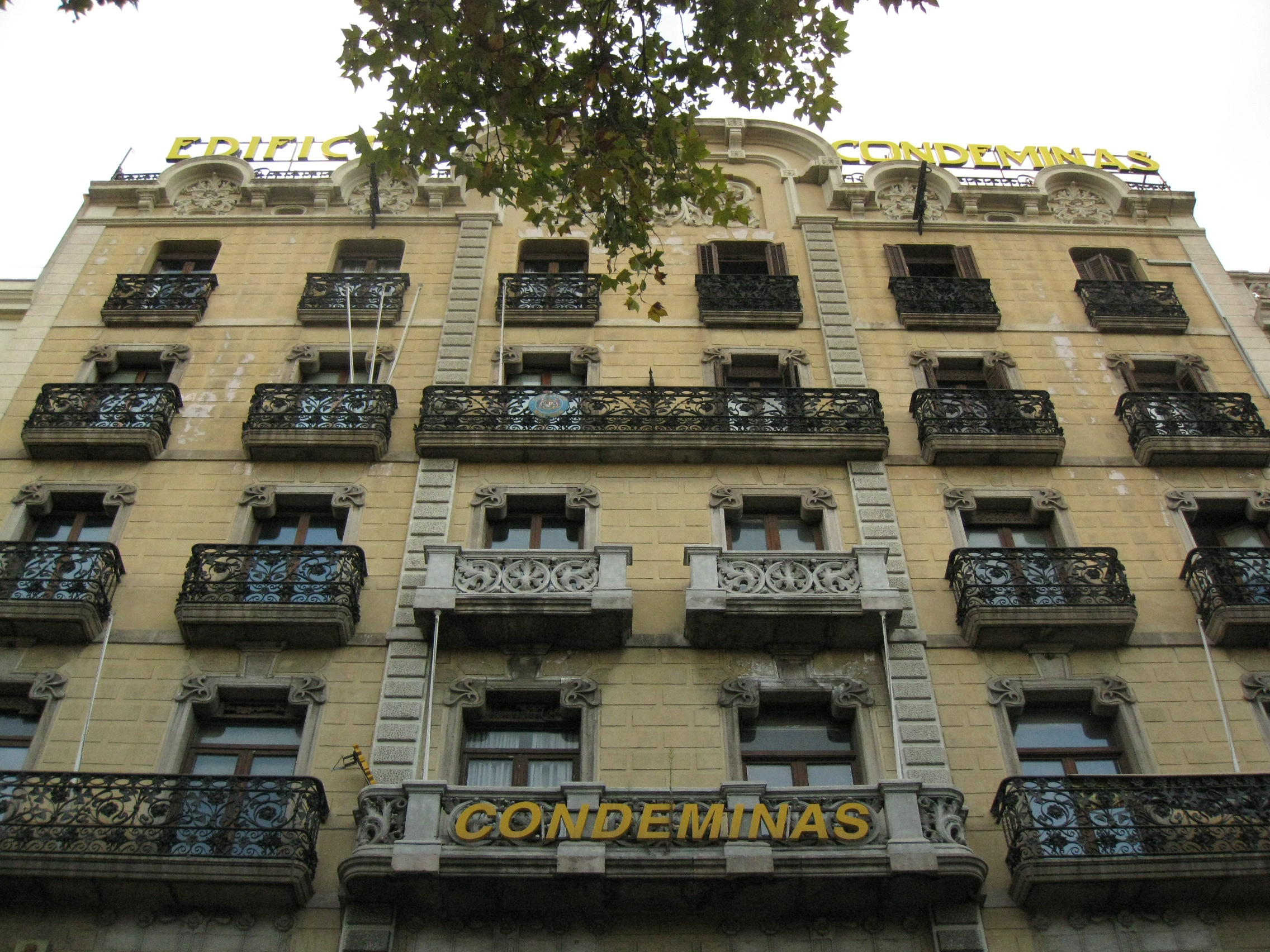 Edifici Condeminas (1915), al núm. 11 del passeig de Colom i façana anterior al carrer de la Mercè (1860), al barri Gòtic de Barcelona. Detall dels balcons de la façana.